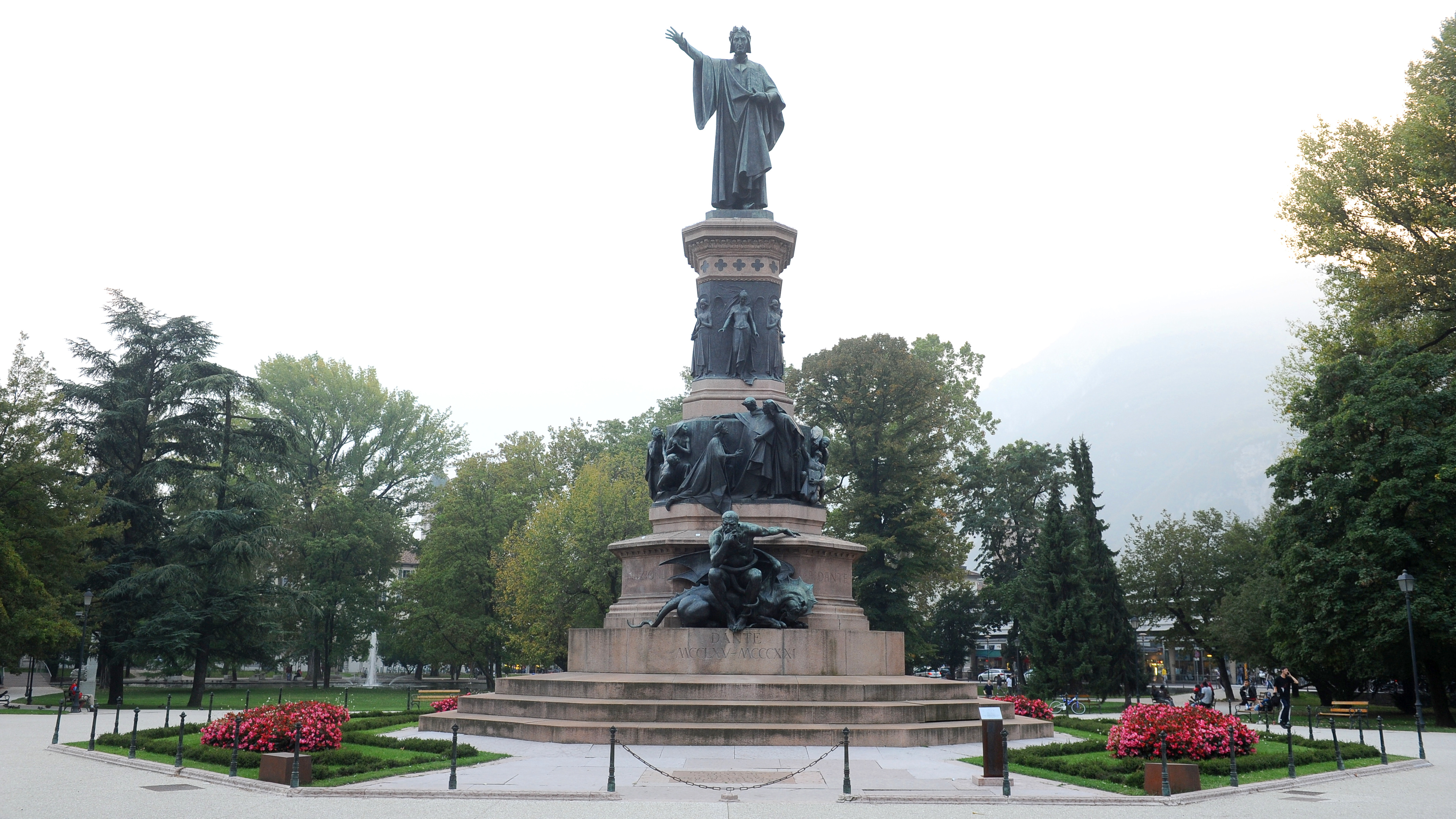 Monumento a Dante Alighieri This is a photo of a monument which is part of cultural heritage of Italy.